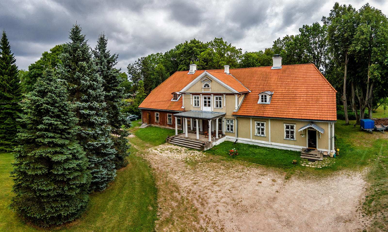 Uue-Varbla mõis